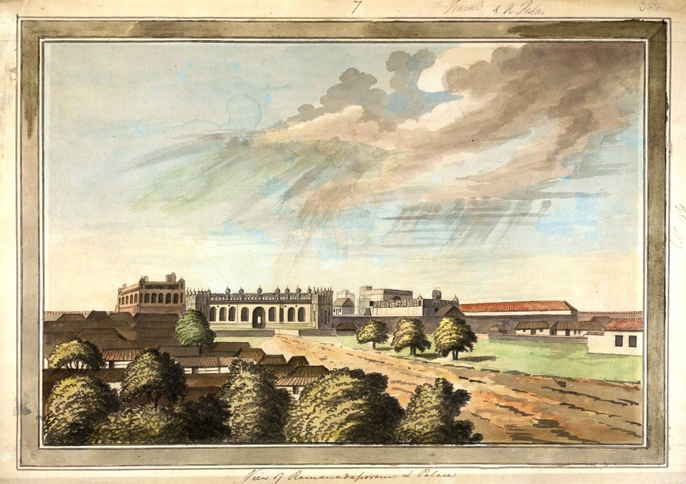 இராமநாதபுரம் அரண்மனை ஓவியம்